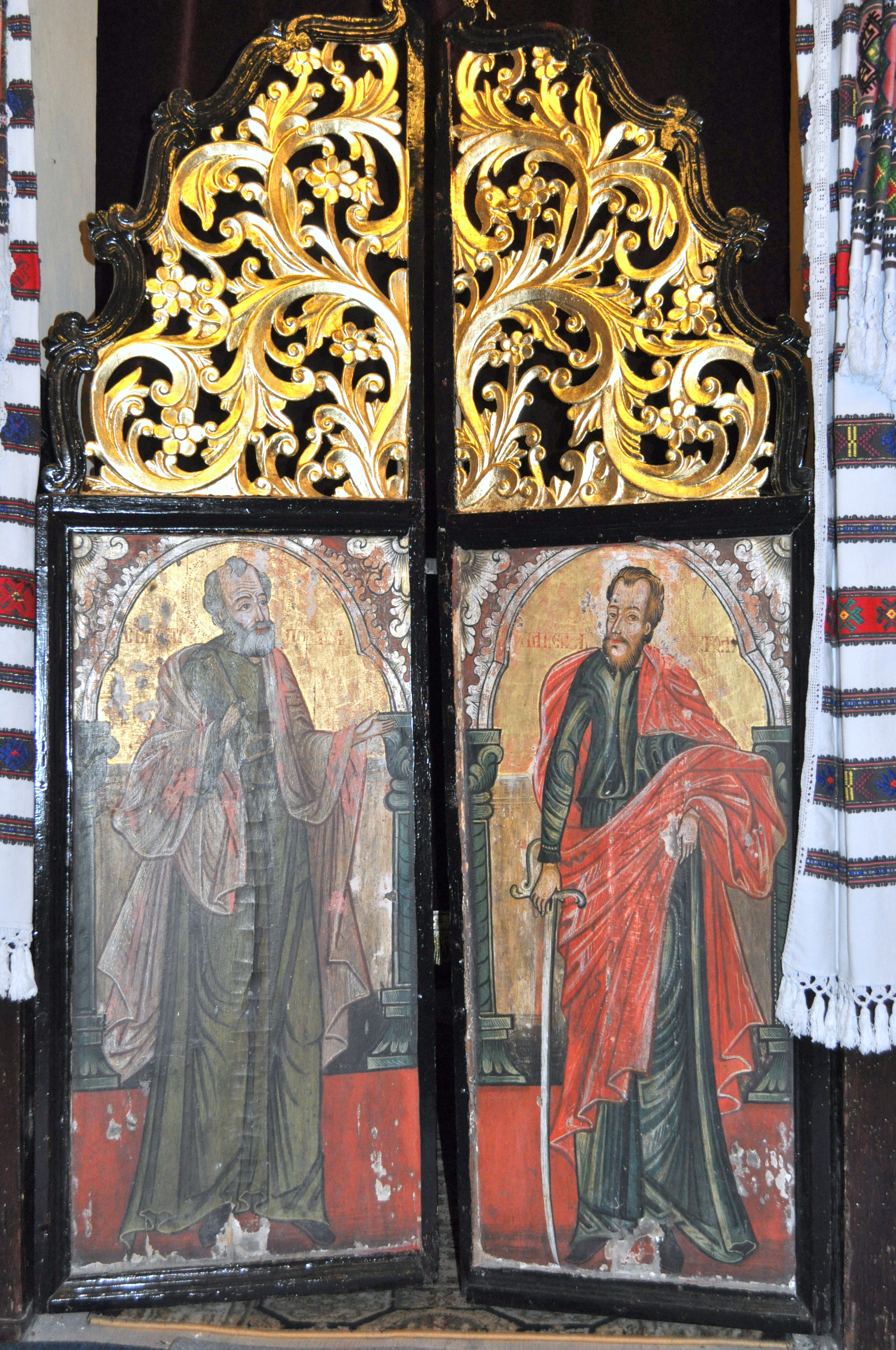 Biserica „Sf. Vasile" din Fofeldea, județul Sibiu